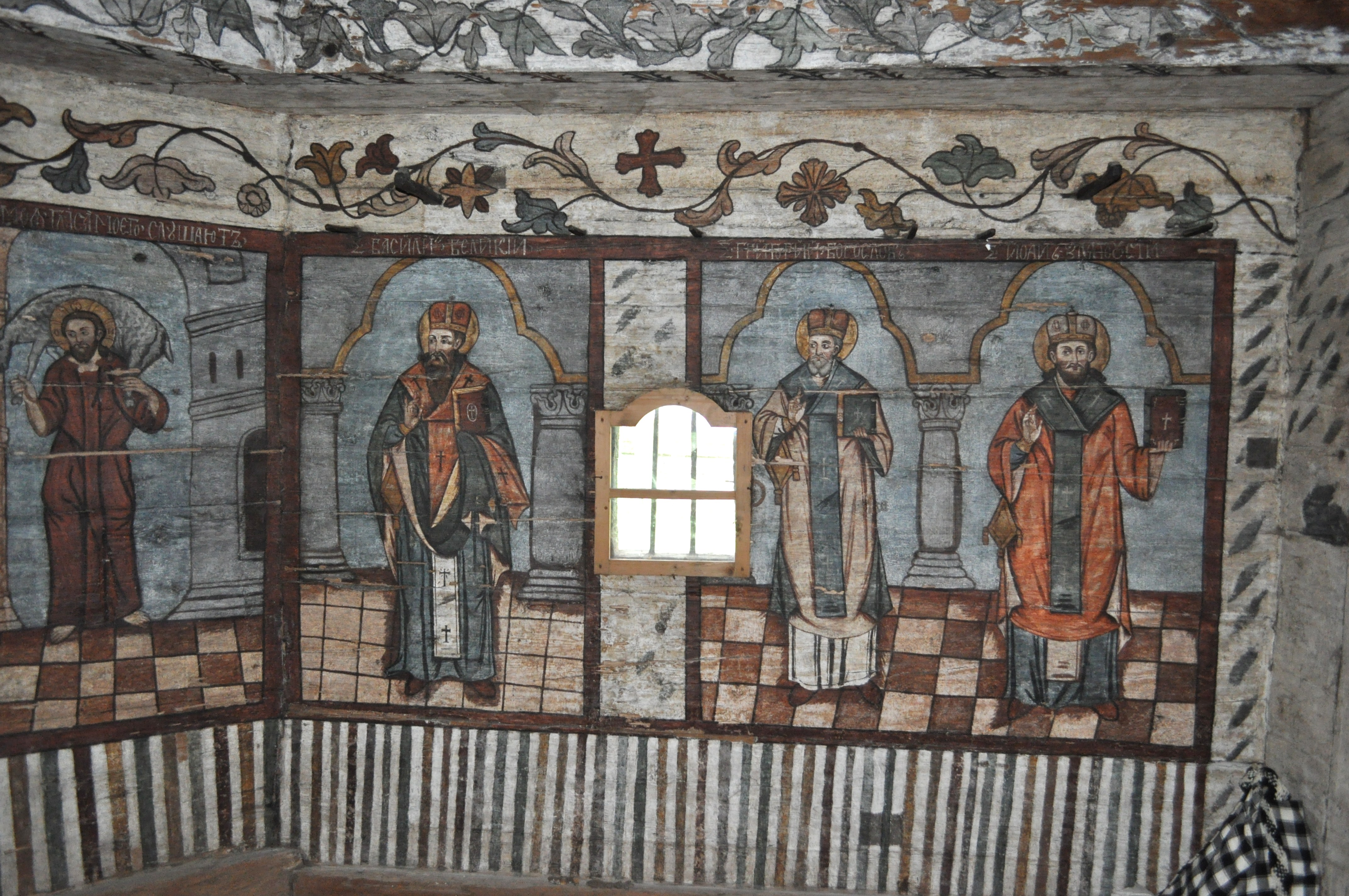 Biserica de lemn "Sfântul Nicolae", sat BOGDAN VODĂ